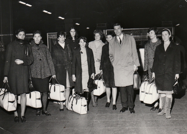 Romano Forastieri con le ragazze della Standa Milano